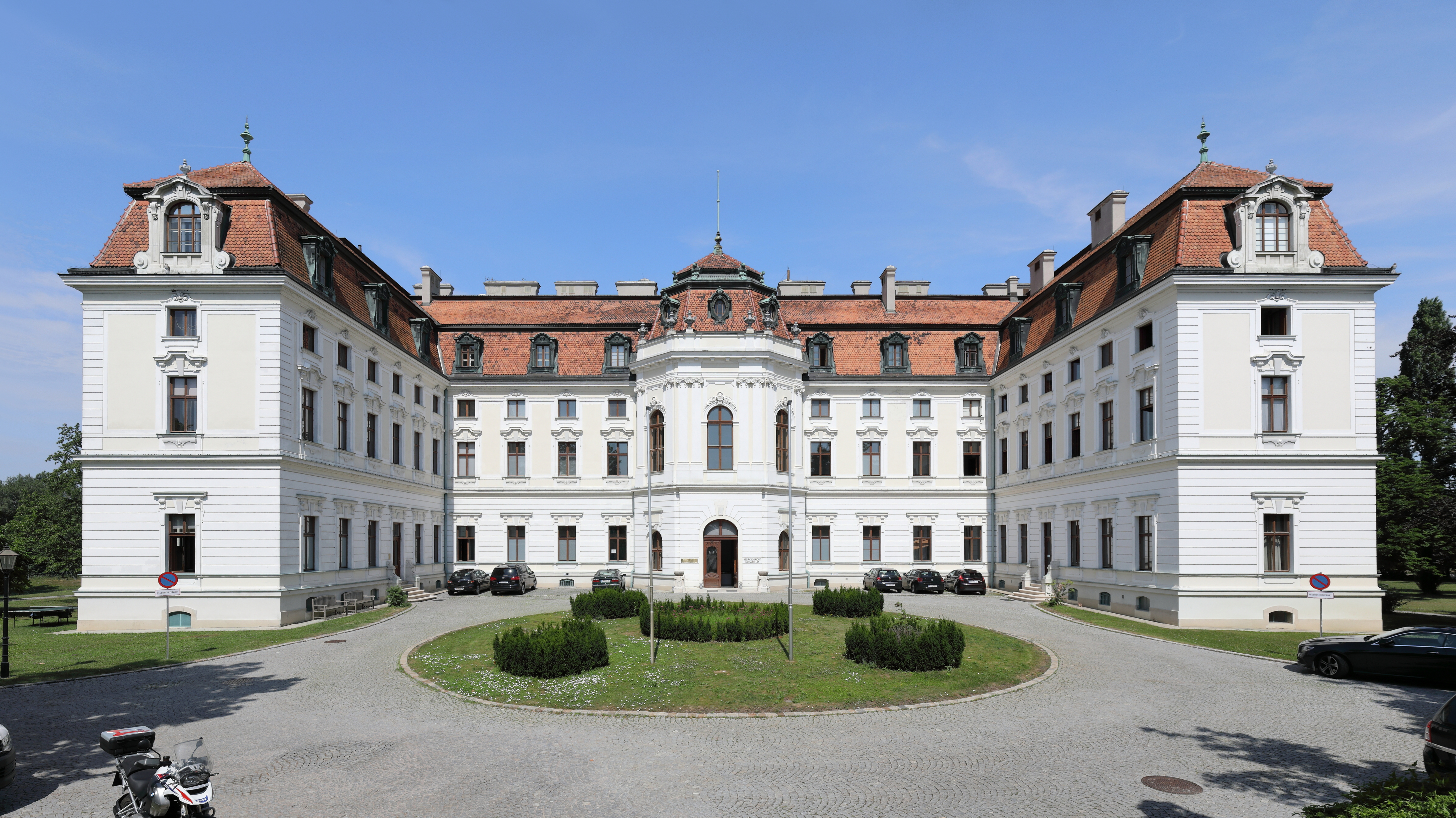 Südostansicht des Bezirksgerichtes (ehemaliges Schloss (Alt)Kettenhof) an der Adresse Schlossstraße 7 in der niederösterreichischen Stadt Schwechat.Das Gebäude wurde als neobarockes dreiflügeliges Schloss mit Ehrenhof im Schwechater Ortsteil Alt-Kettenhof im Auftrag des Großindustriellen Anton Dreher nach Plänen des Architekten Emil Bressler und dem Schwechater Baumeister Johann Miksch von 1901 bis 1902 errichtet. Seit 1960 ist darin das Bezirksgericht untergebracht.